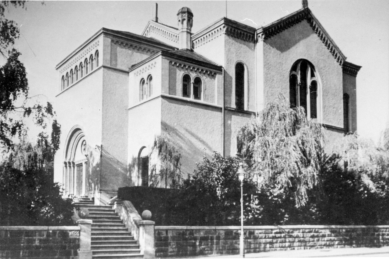 Die Synagoge nach 1926; mit dem westlichen Portalsanbau.